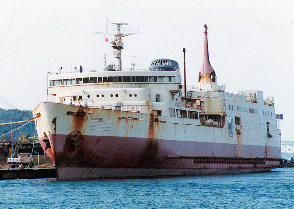 LADY TERRY （元JR北海道 青函連絡船 石狩丸）